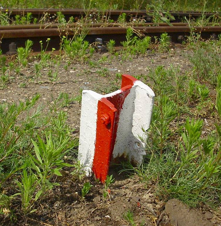 Wskaźnik W 17 wykonany z dwuteownika na polskiej sieci kolejowej.